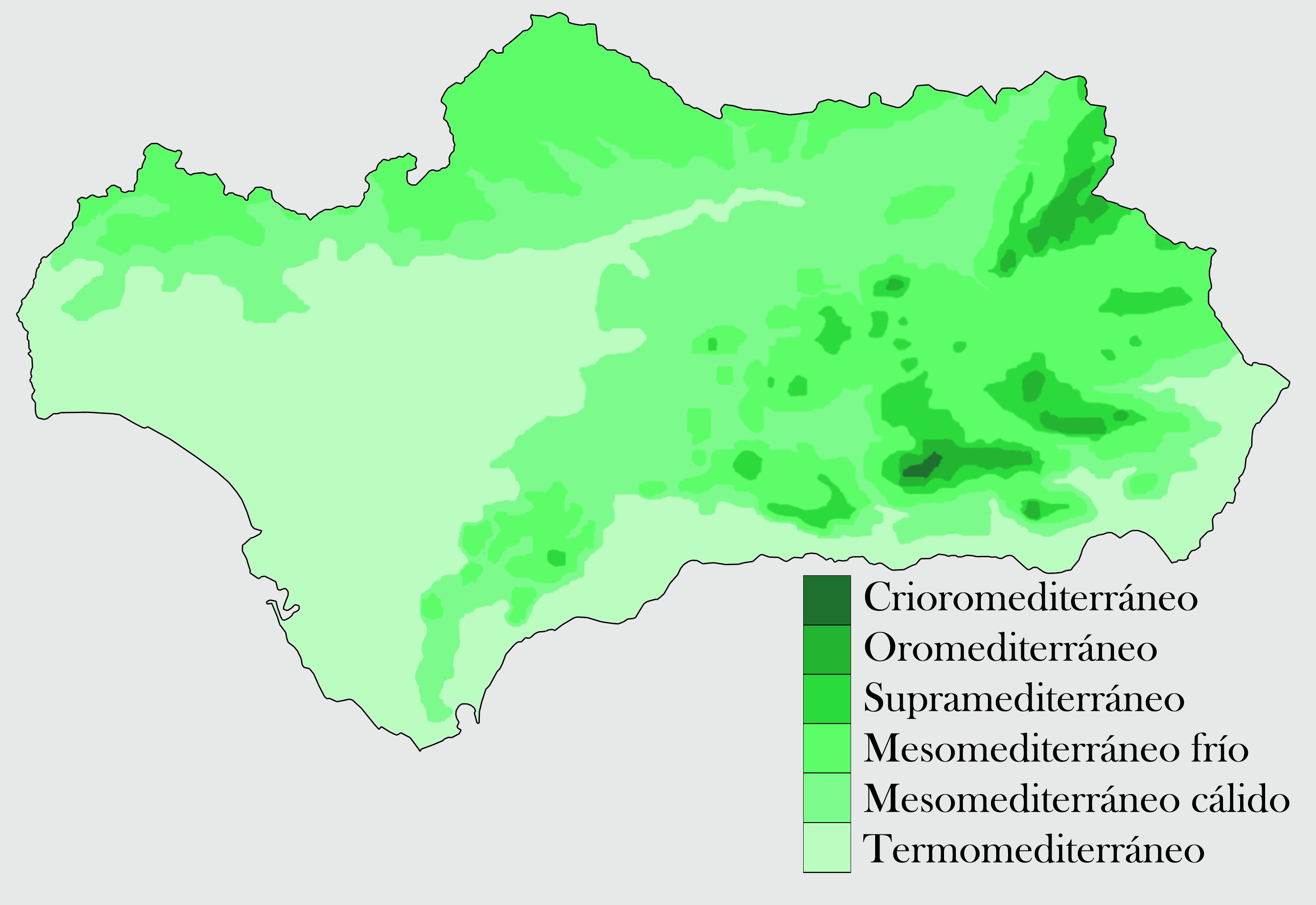 Pisos climáticos de la Comunidad autónoma de Andalucía, España.